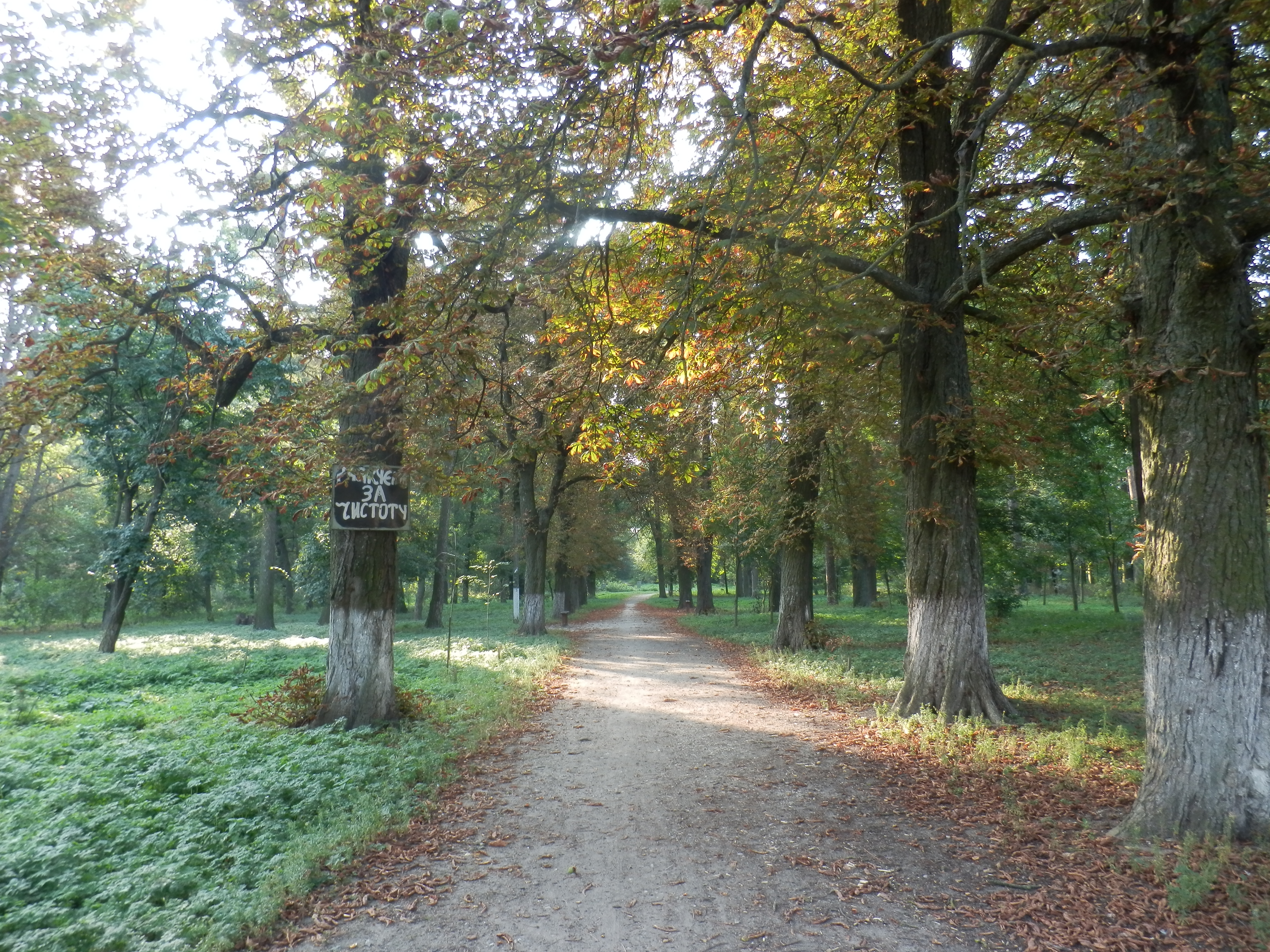 Парк садиби Катериничів, Бобровиця, вул. 30 років Перемоги, 204